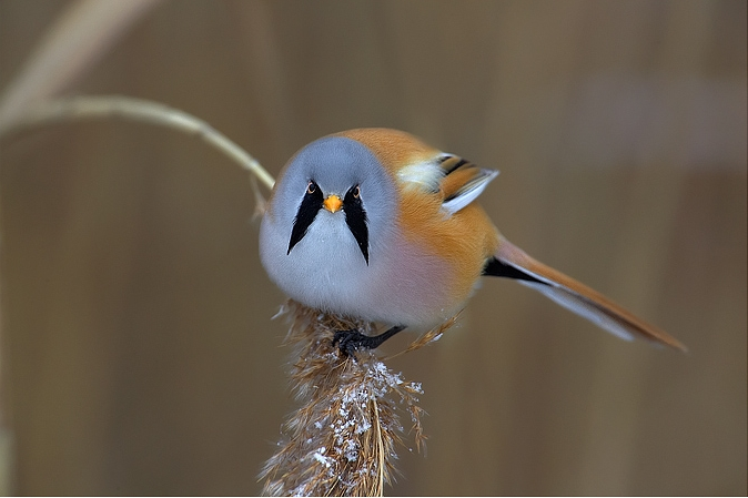 Panurus biarmicus (male), Chomoutov, Czech Republic